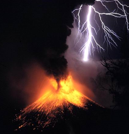 Indonesia - Lombok: Mount Rinjani - A smaller outbreak in 1995. Utklipp for bruk på framsidebilete - Scanwiki